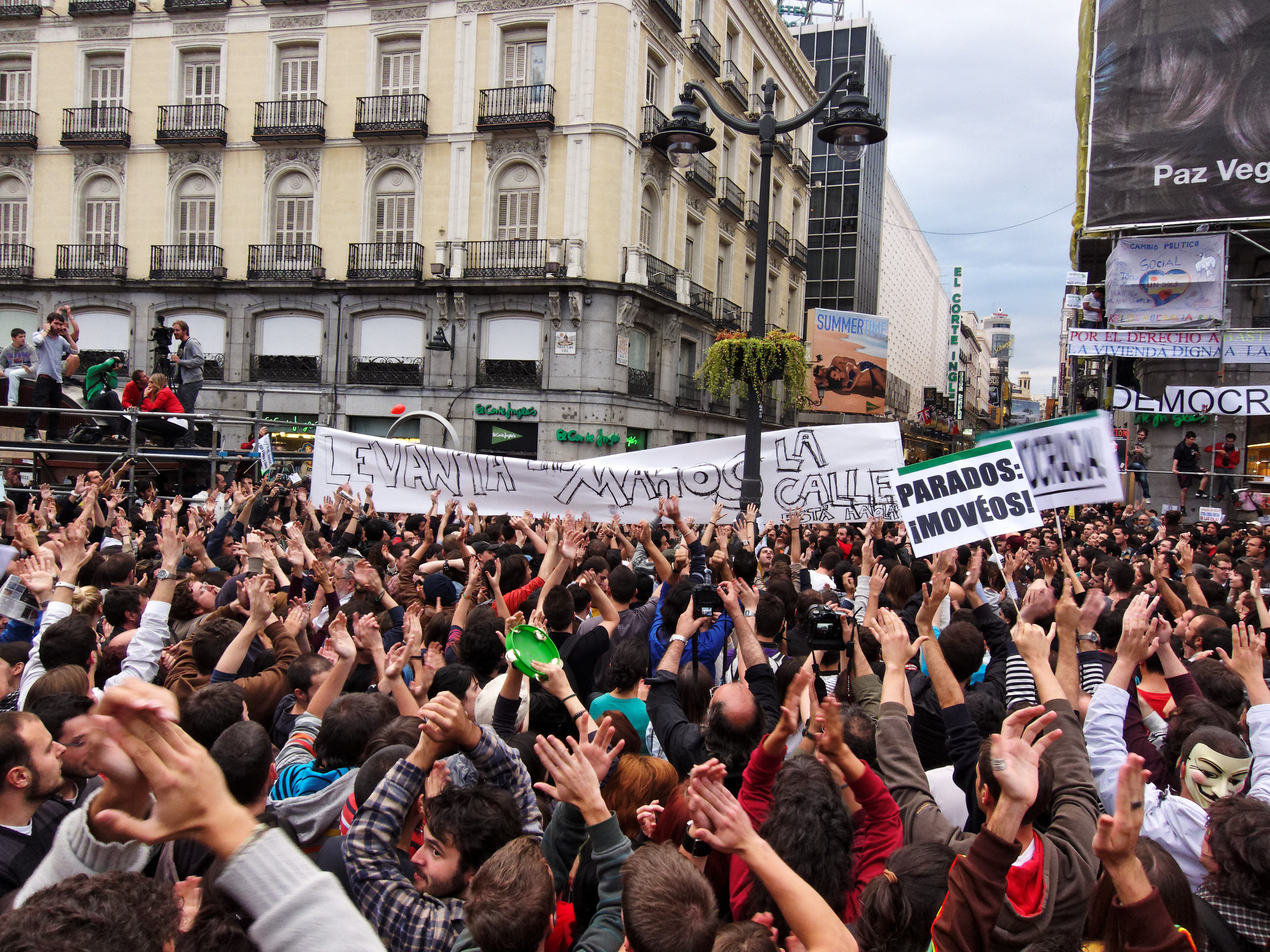 Manifestantes en la concentración de Democracia Real Ya. Puerta del Sol, Madrid, España.